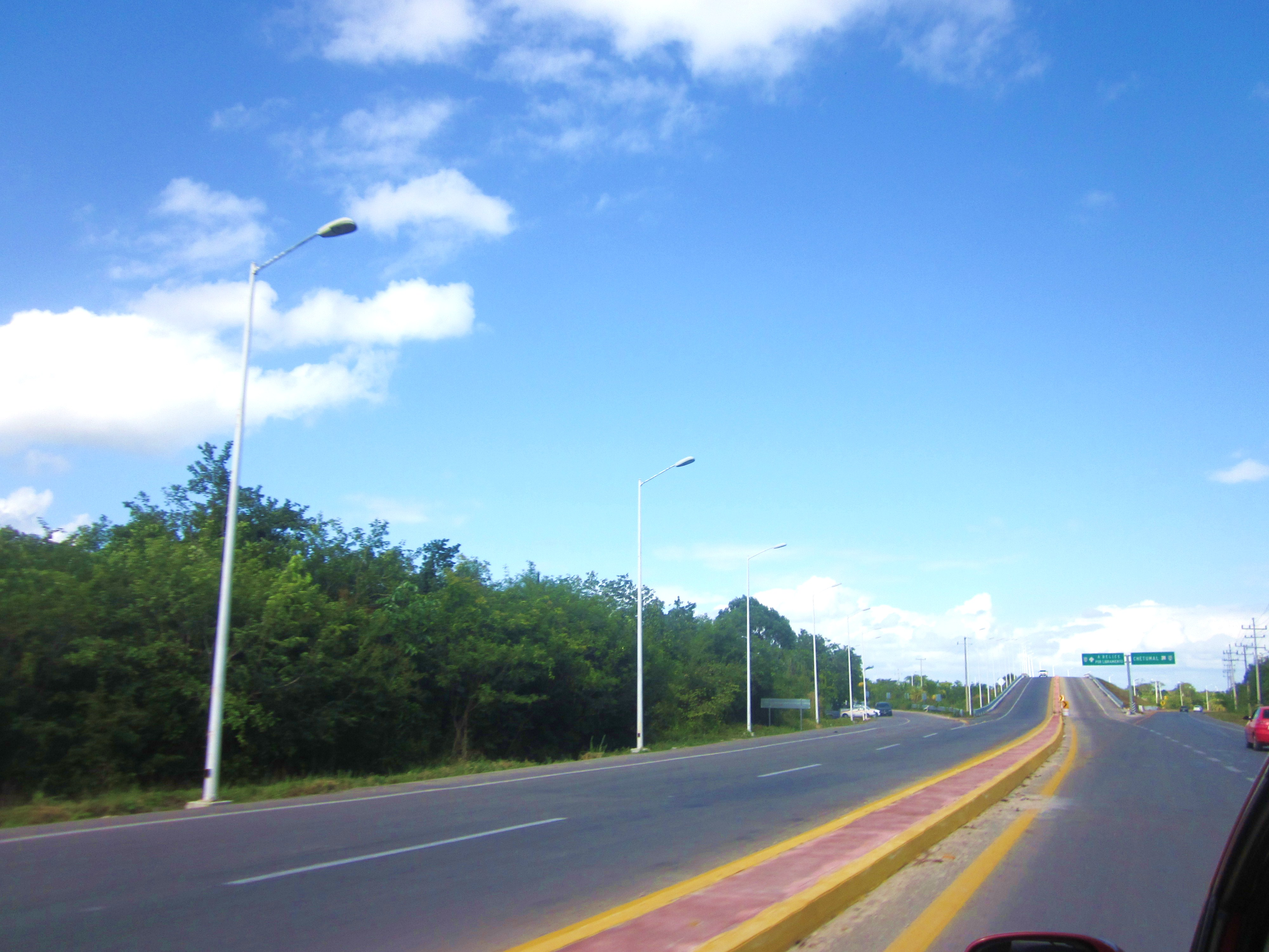 Carretera Chetumal-Subteniente López.